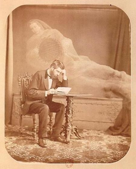 Édouard Isidore Buguet (1840-1901). "Анти-спиритическая" фотография Буге. "Призрак" держит таблицу с надписью: Лучше Месмера и Калиостро. Призраки на выбор. Успех гарантирован. Невидимые манипуляции под носом у клиента. Трюки медиумов.